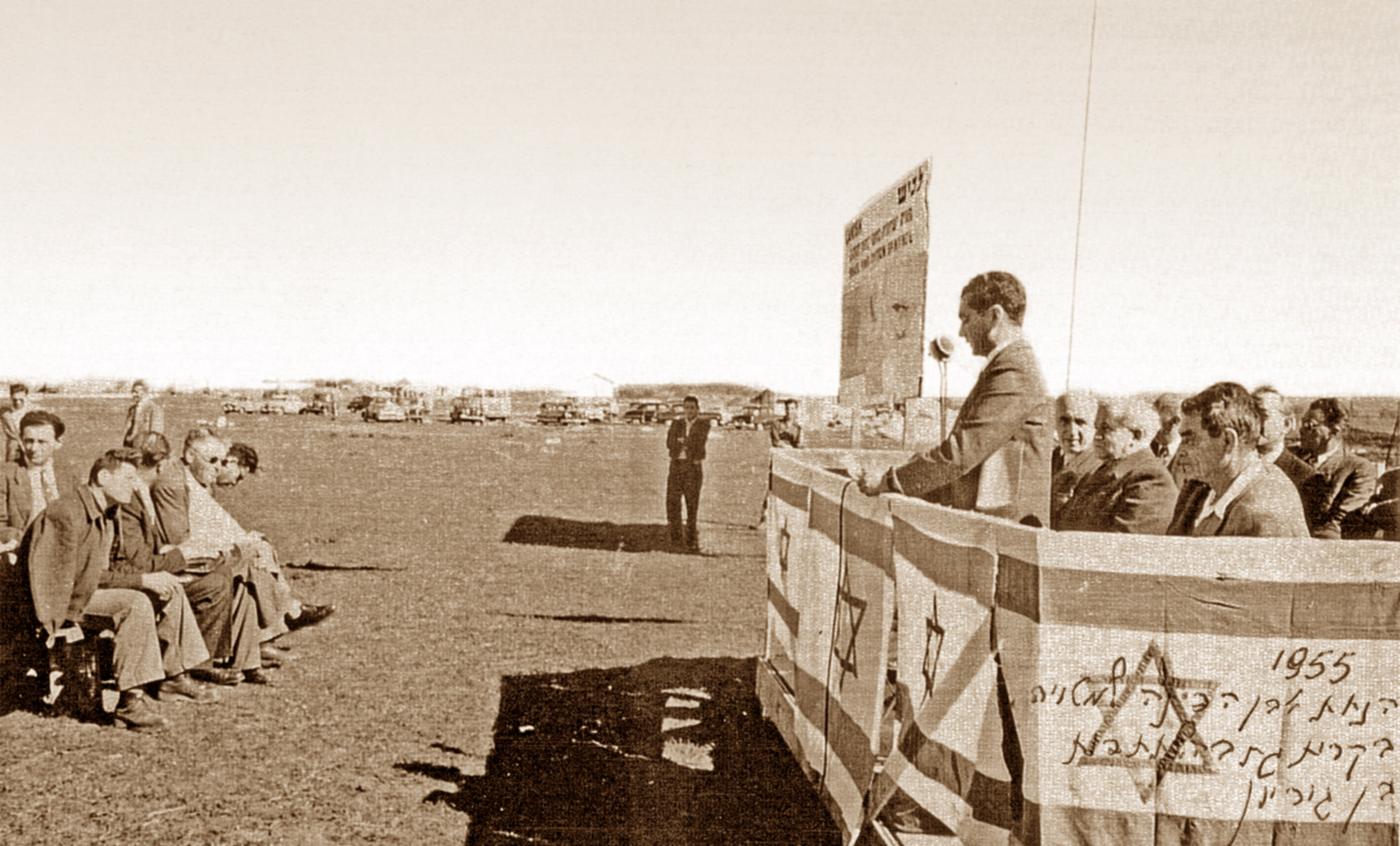 שמואל פלקוביץ נואם בטקס הנחת בן פינה למטוויה במקום שעתיד להיות איזור התעשייה של קרית גת 1955